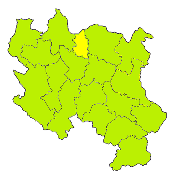 Map of Podunavlje